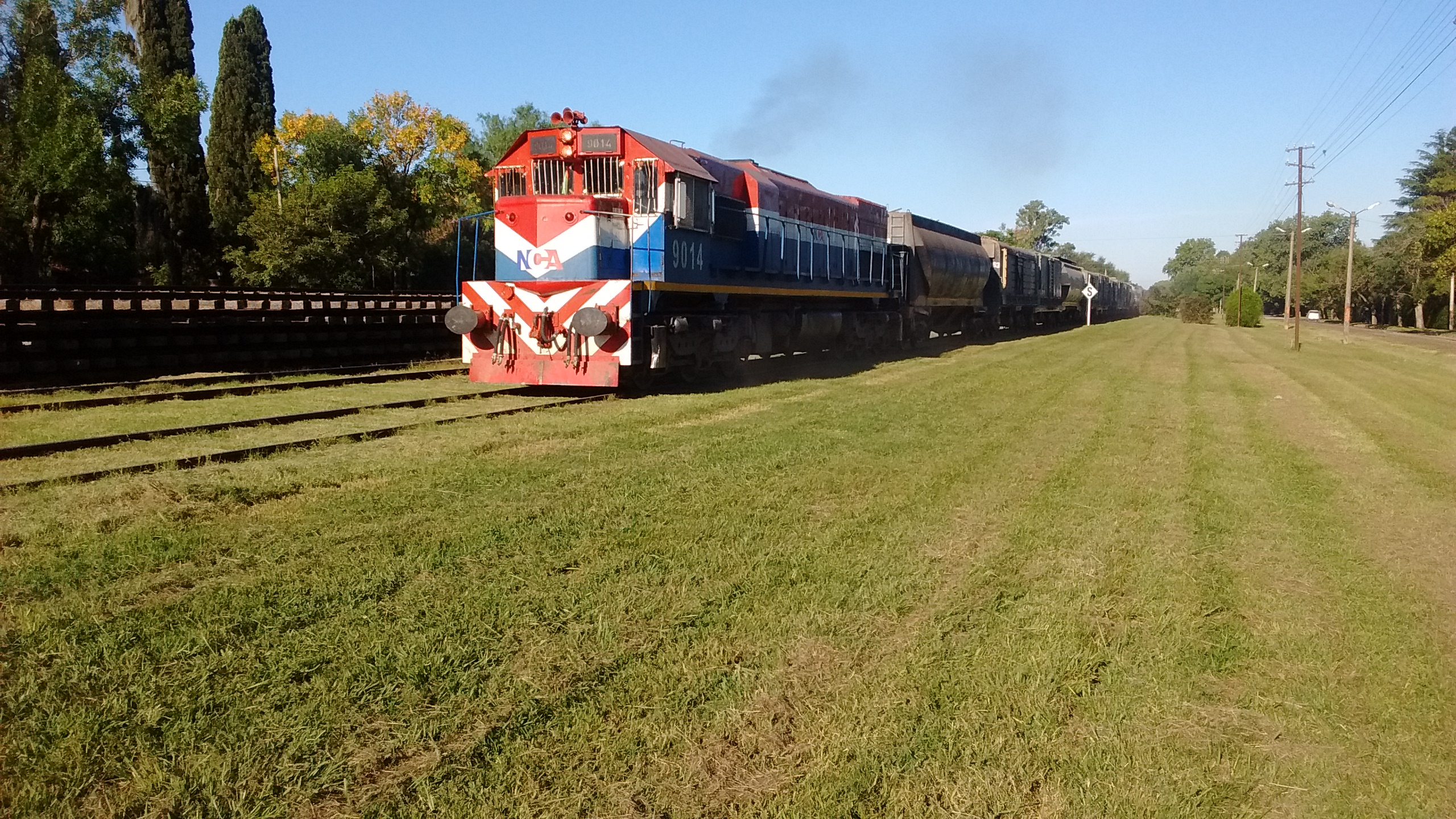 Paso por Funes del ferrocarril del Nuevo Central Argentino. Vista mirando hacia Rosario.